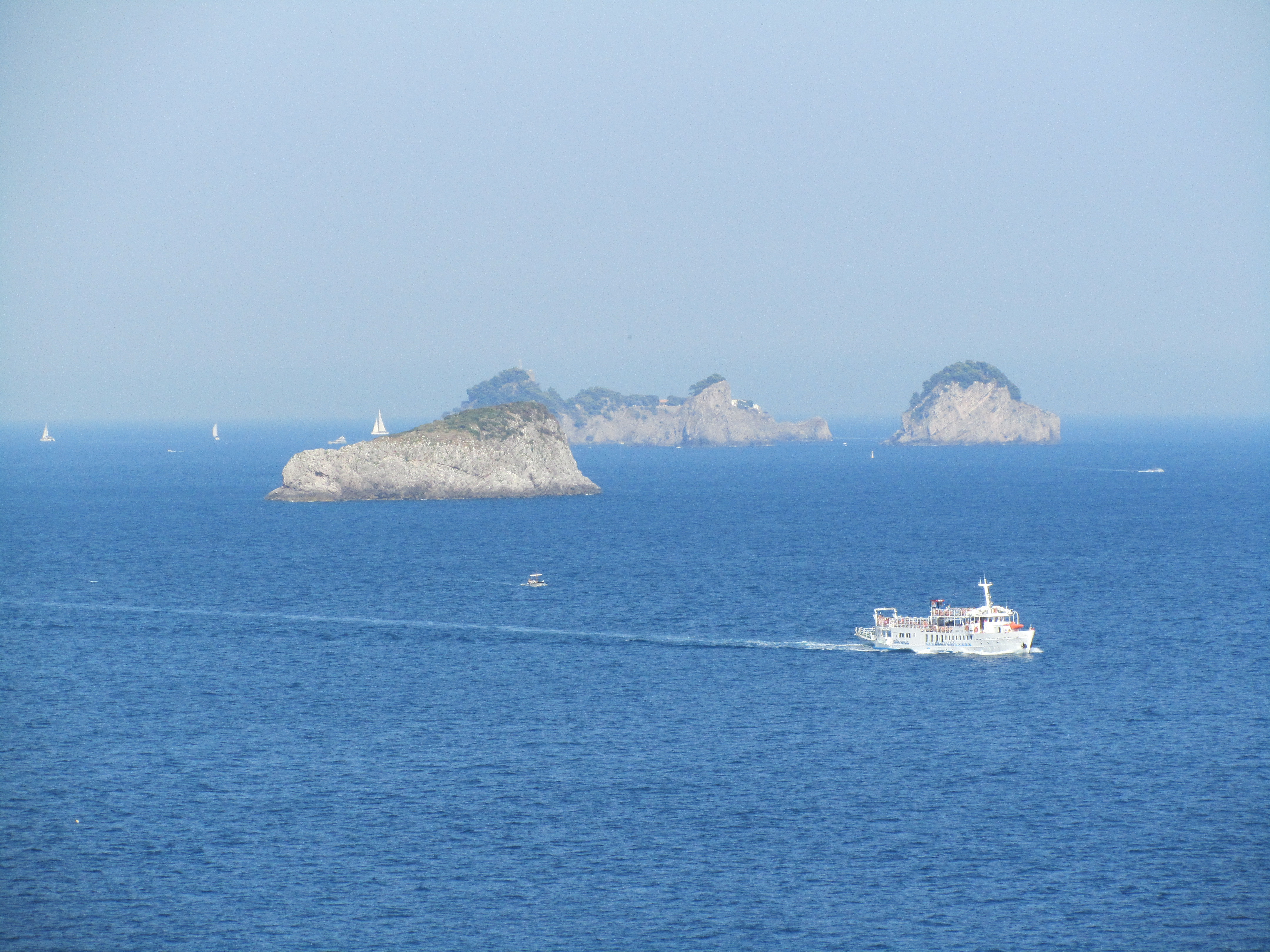 Amalfiküste (von Nerano, Massa Lubrense – NA aus gesehen): Die drei Inselchen Li Galli, auch Le Sirene genannt, gehören zur Gemeinde Positano